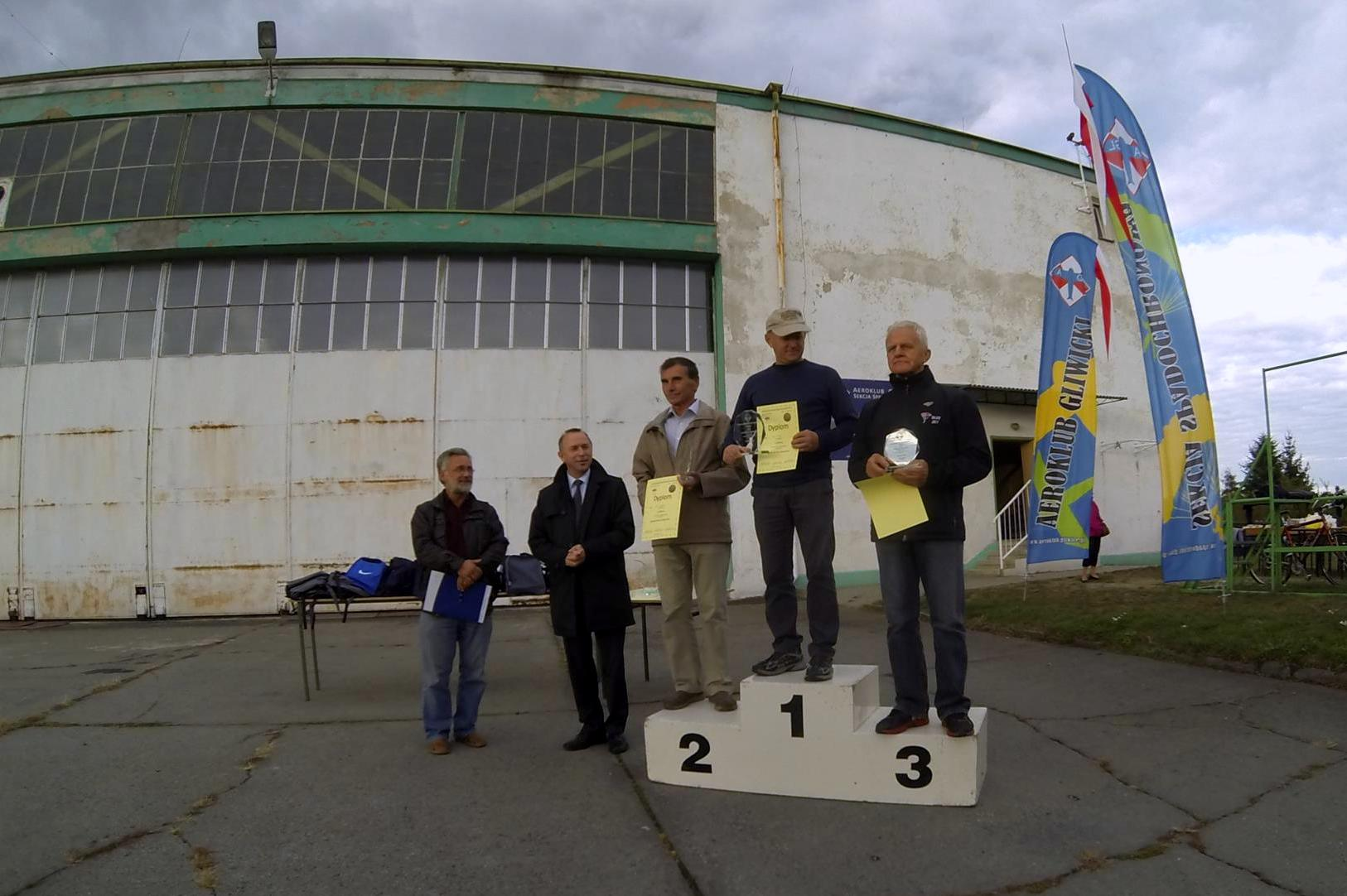 Spadochronowe Mistrzostwa Śląska 2015, zwycięży kategorii spadochrony klasyczne: I miejsce – Jan Mach, II miejsce – Jan Isielenis, III miejsce – Józef Łuszczki. Od lewej stoją: 1. Ryszard Ptaszek (Szef wyszkolenia Aeroklubu Gliwickiego), 2. Bogdan Traczyk (Prezes Zarządu Aeroklubu Gliwickiego)